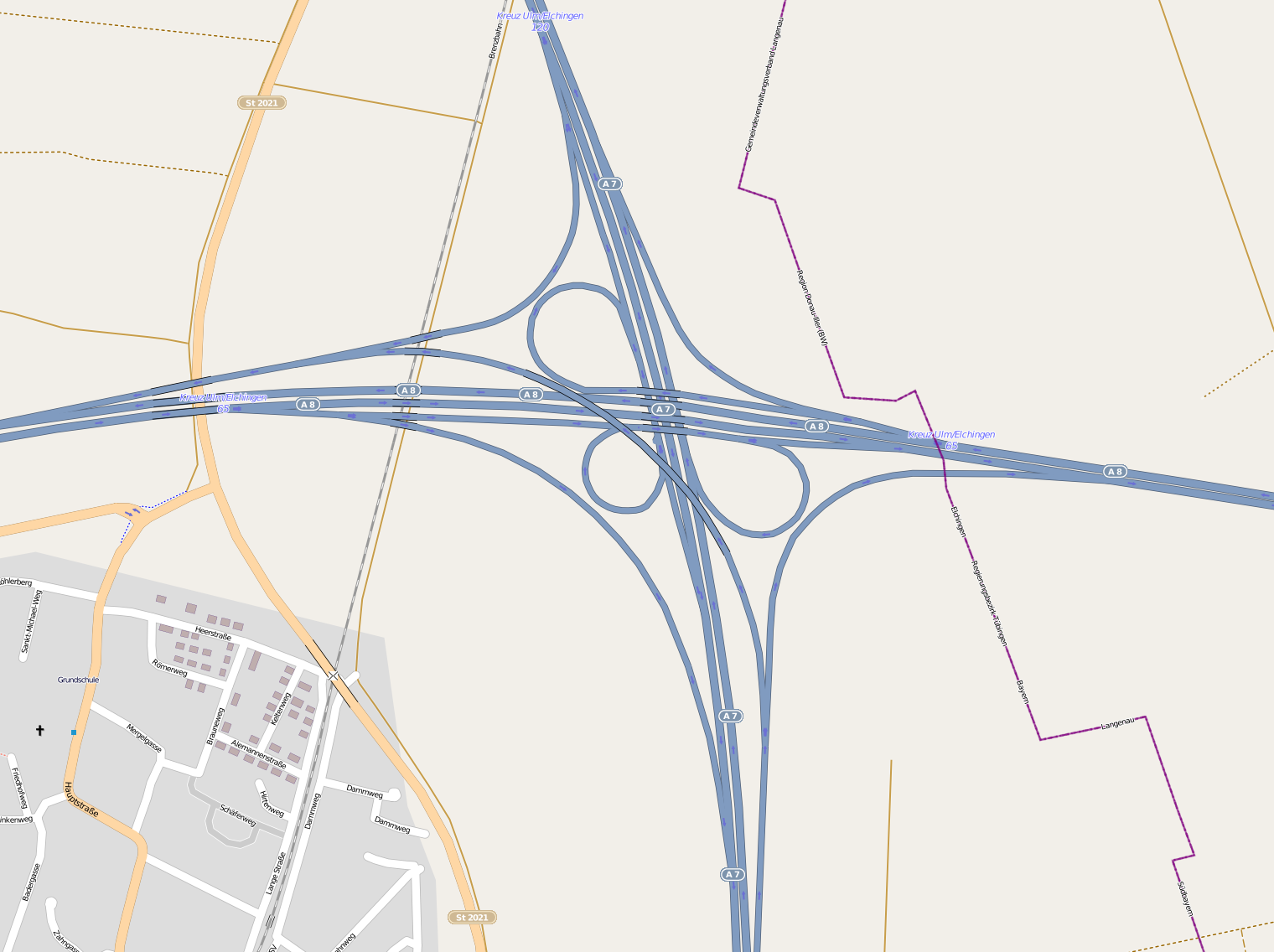 Lages des Autobahnkreuzes Ulm/Elchingen (A8/A7) bei Elchingen.